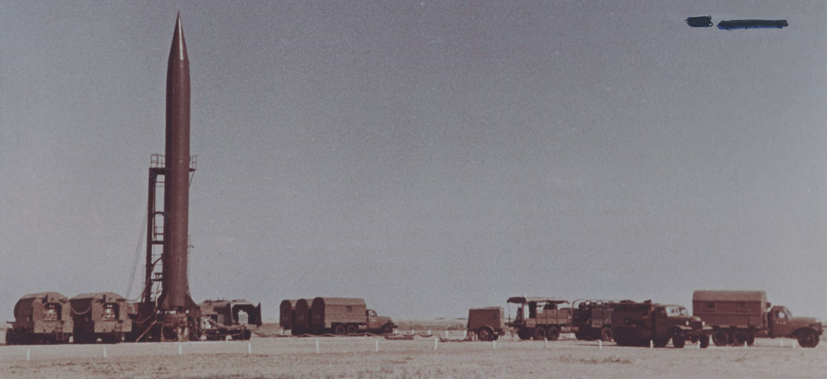 Ракетный комплекс Р-5М, принятый на вооружение 21 июня 1956 г. стал первым отечественным ракетным комплексом с ядерным боевым оснащением